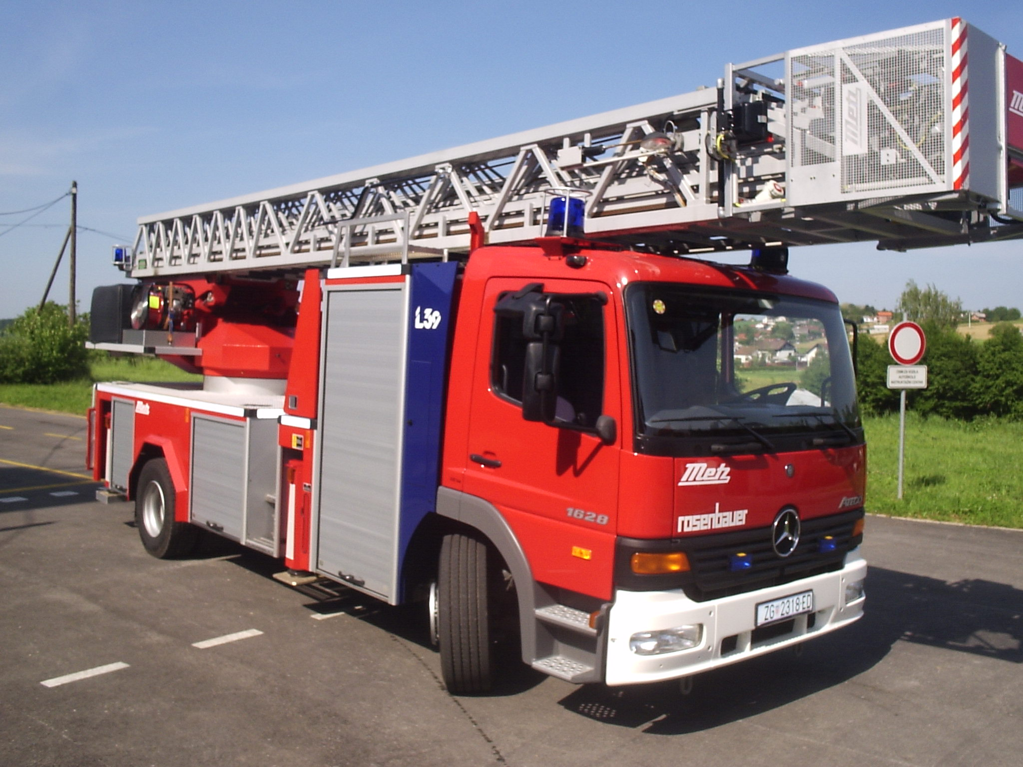 Auto ljestva